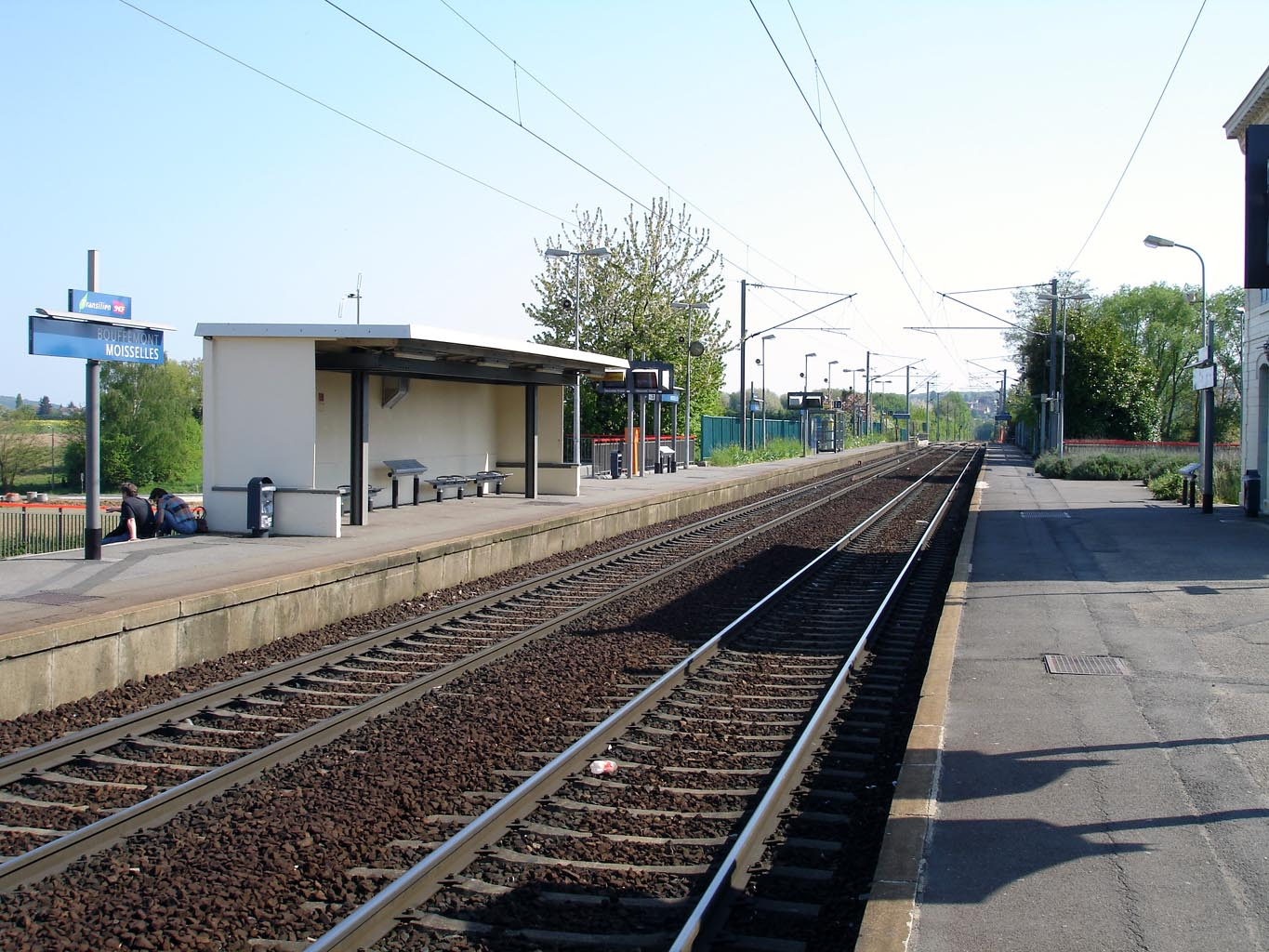 Gare de Bouffémont - Moisselles à Bouffémont (Val-d'Oise), France